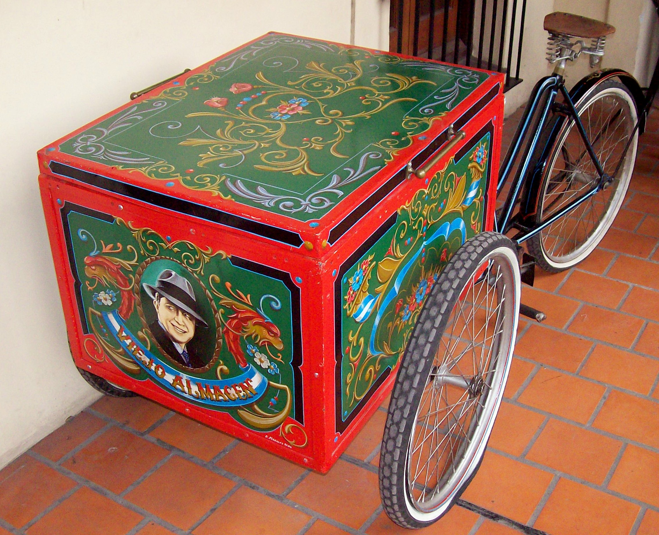 Fileteado porteño: Tricíclo, en el Centro Cultural Marcó del Pont, en el barrio de Flores, ciudad de Buenos Aires. Autor Edgardo Morales